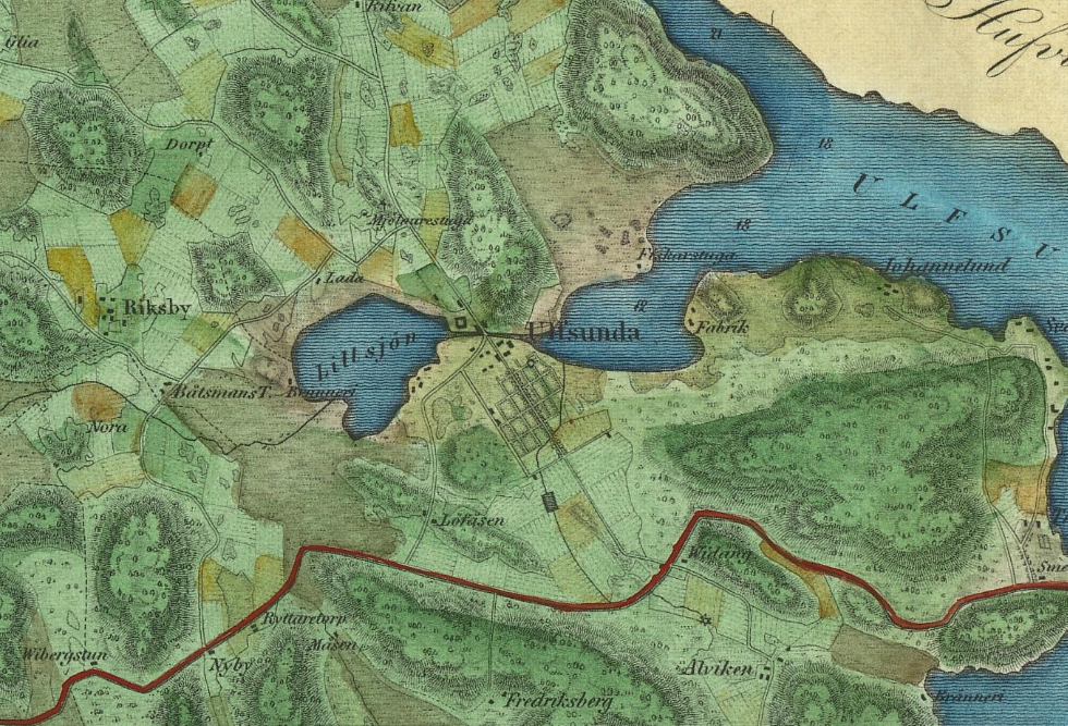 Del av karta över Bromma socken uti Stockholms län och Sollentuna härad. Upprättad i Kungl. General Lantmäterikontoret 1829. Graverad av C.G. Lundgren.